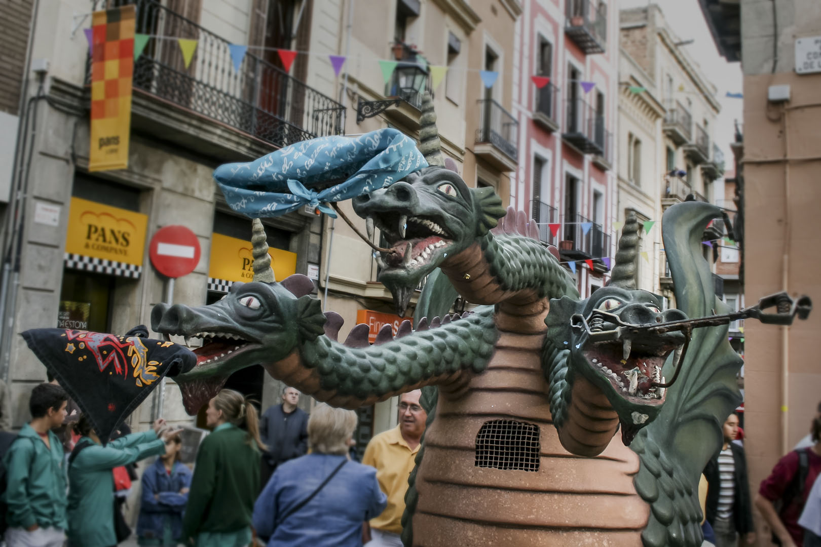 El Drac de Sarrià, els caps es diuen Monterols, Tibidabo i Putxet